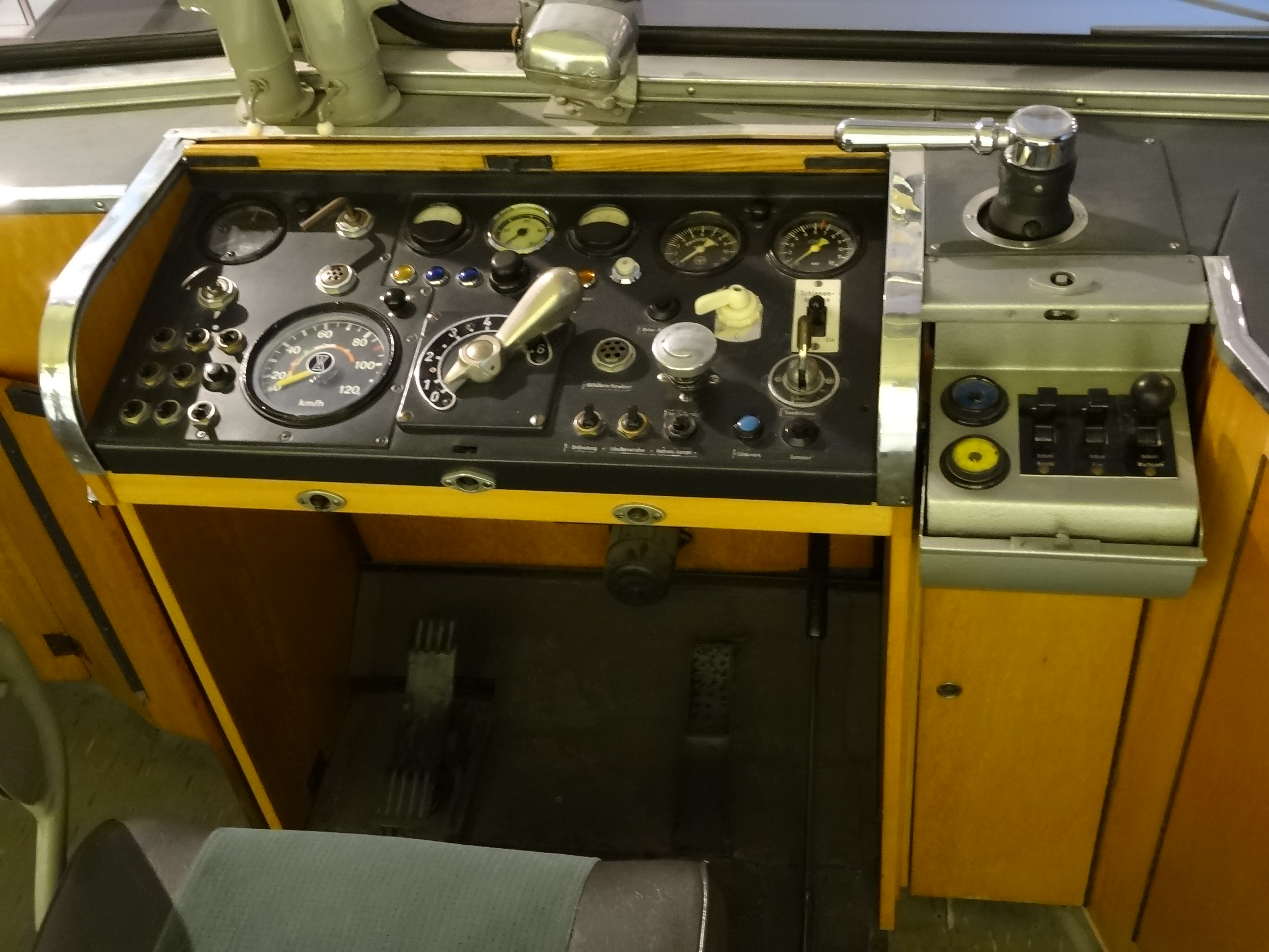 Gegenüberstellung Schienenbus - Goggomobil